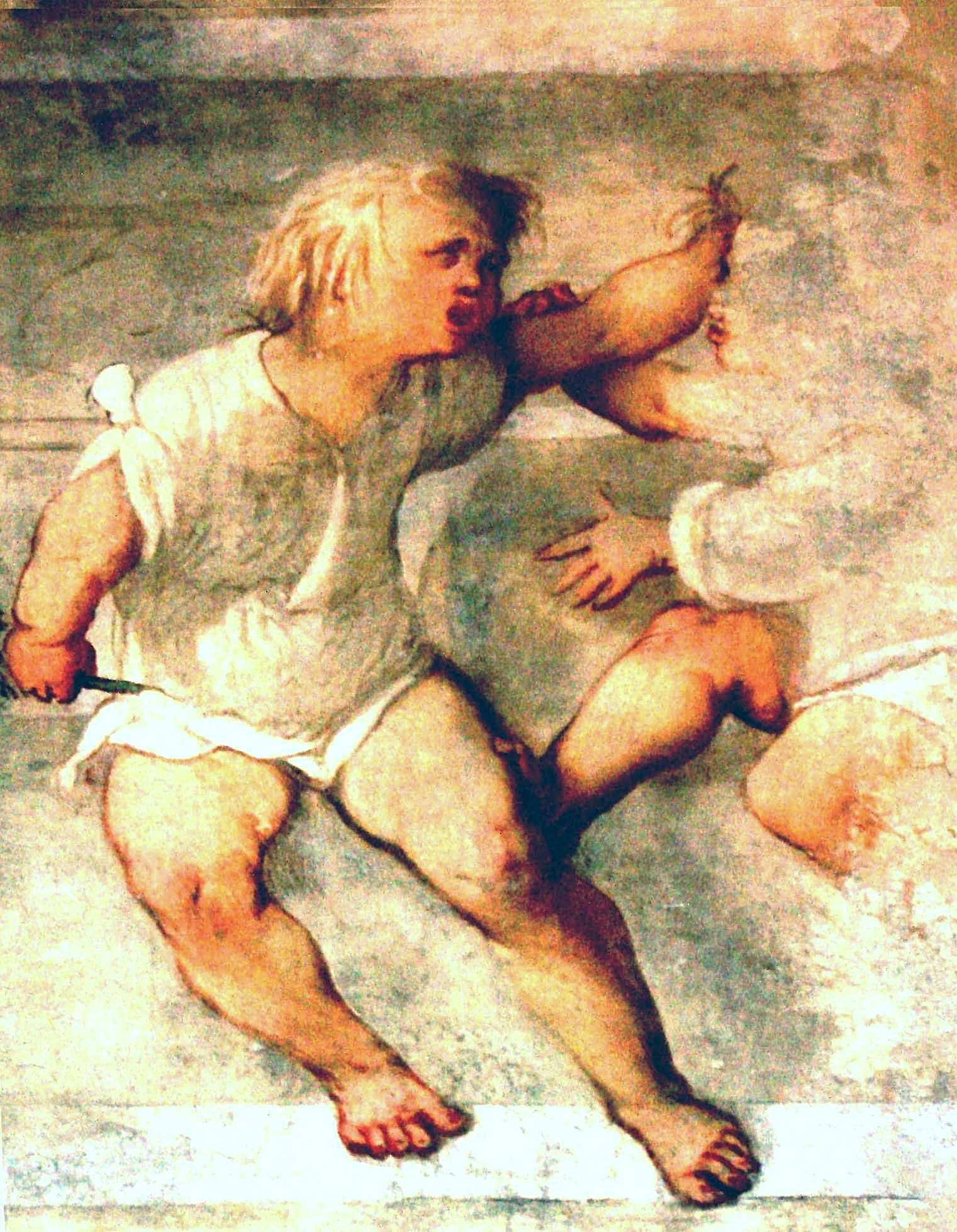 Gerolamo di Romano called Romanino, "ECcce Homo" (detail of two quarrelling children), 1533-34, fresco, Church of Santa Maria della Neve, Pisogne (BG), Italy